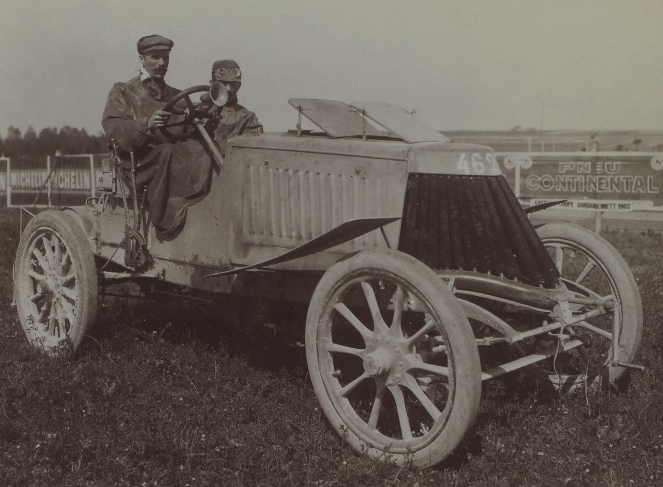 [Collection Jules Beau. Photographie sportive] : T. 26. Année 1904 / Jules Beau : F. 19v. [Coupe Gordon Bennett, 20 mai 1904]